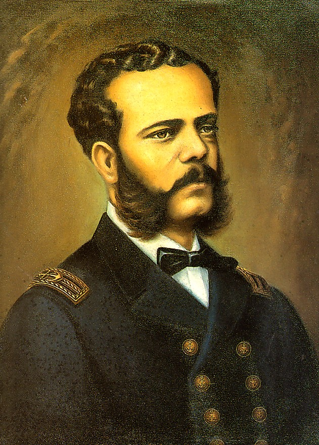 Aurelio García y García (1836 - 1888) marino y científico peruano